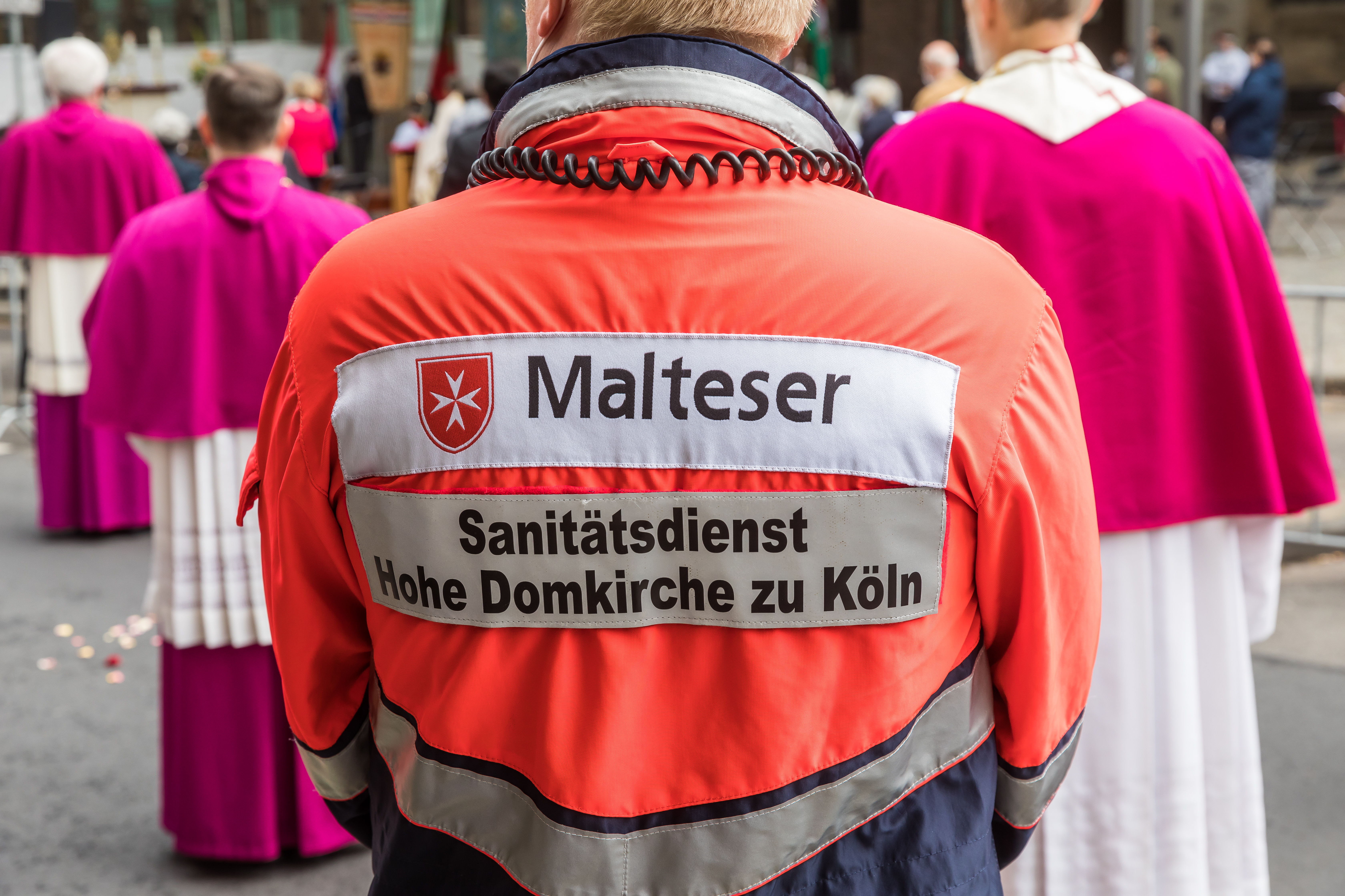 Fronleichnam Kölner Dom 2020. Sanitäter des Malteser Hilfsdienstes